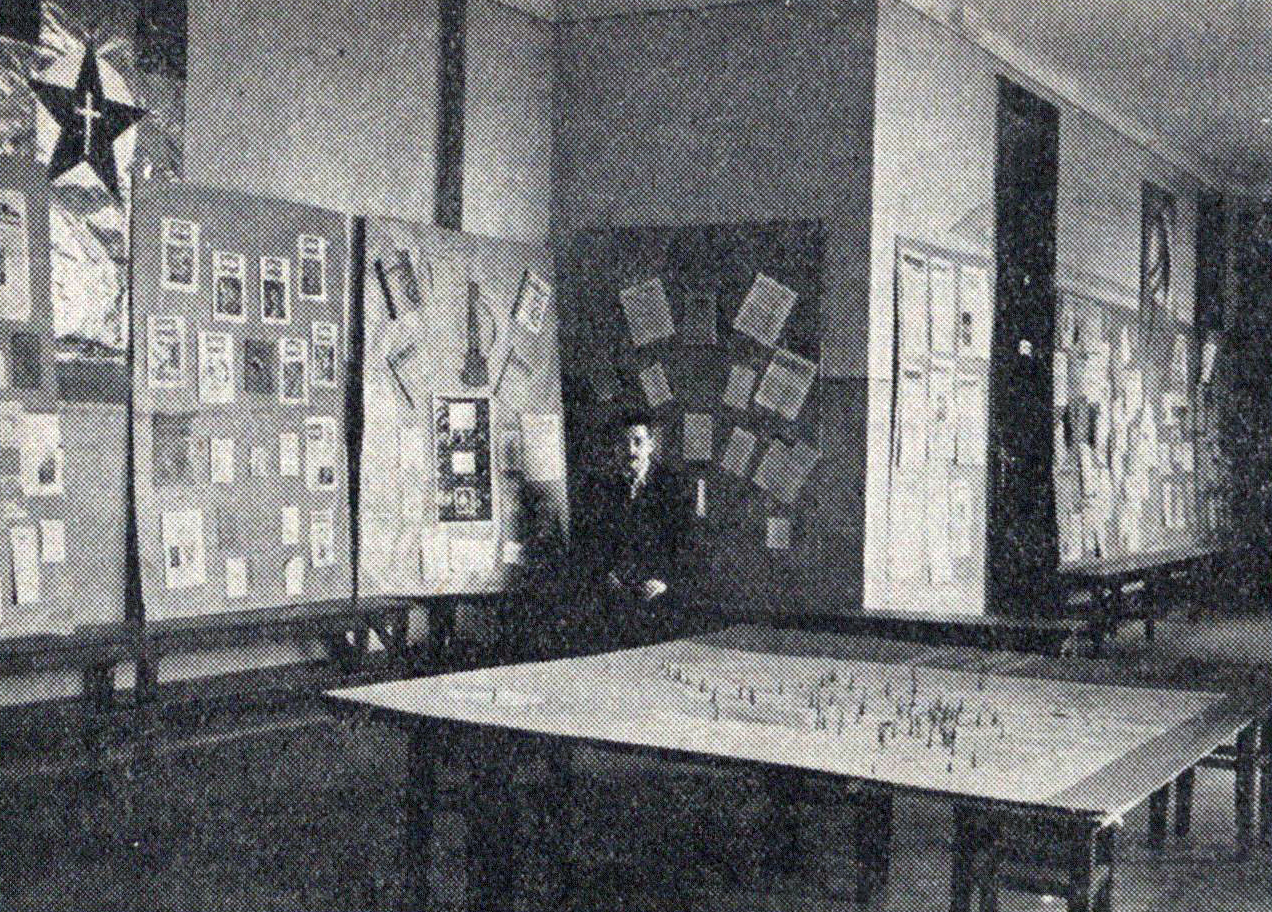 Ekspozicio dum la XXIX-a Kongreso. Ejo: Popola Lernejo Strato Karowa Varsovio. Parto el salonego de Gazetaro Esperantista. Antaŭ sur la tablo, geografia karto pri la Radio-dissendoj kun programo en Esperanto. Sidante: D-ro Marek Wajsblum, organizinto de la Ekspozicio.